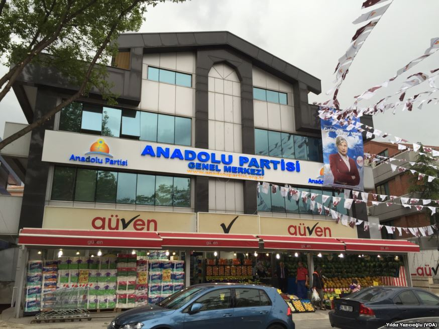 Turkish general election, 2015